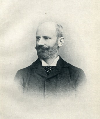 Rudolf Otto von Ottenfeld (1856 - 1913), Rakouský malíř a pedagog.